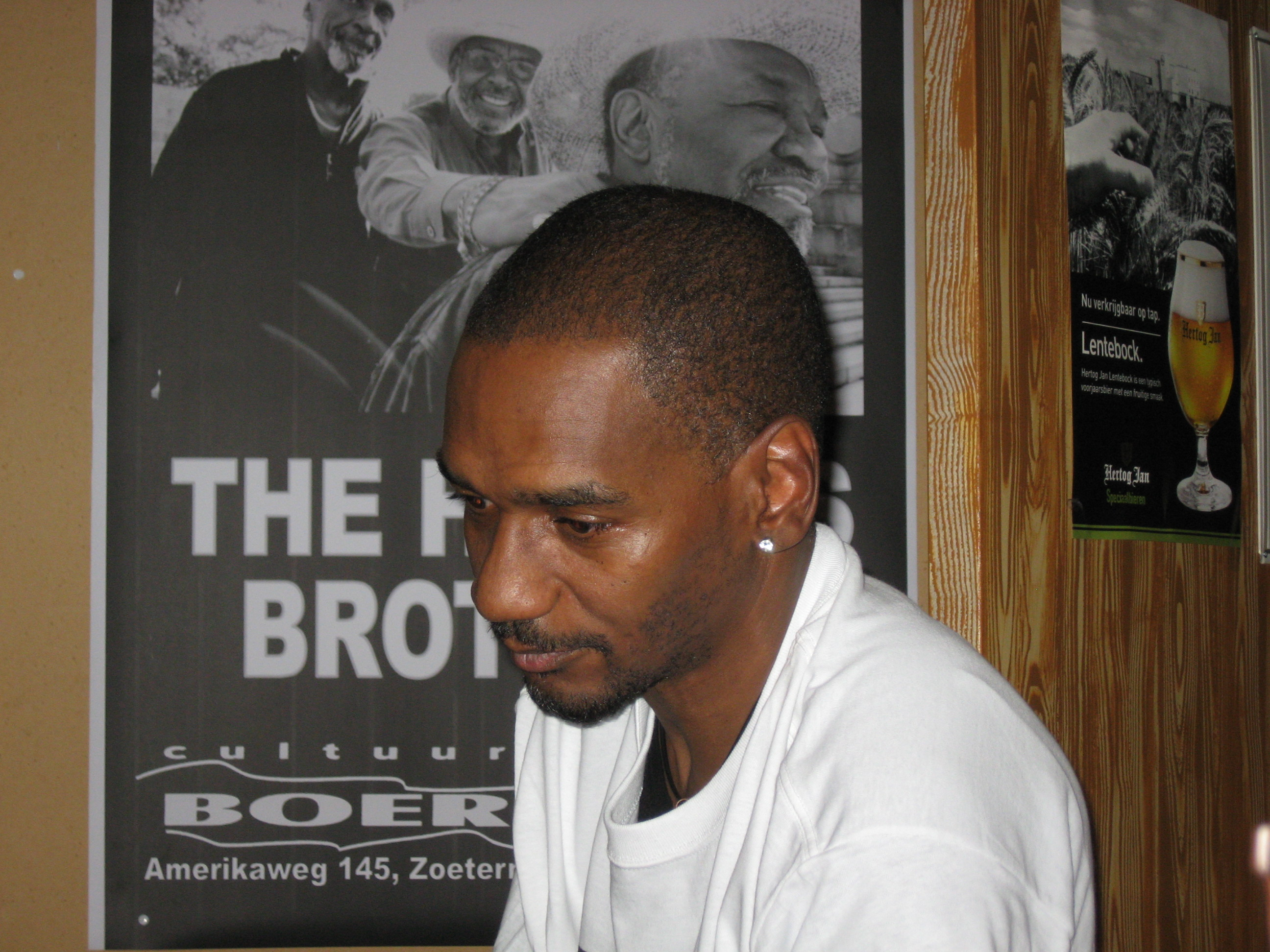 Foto gemaakt in "De Boerderij" te Zoetermeer